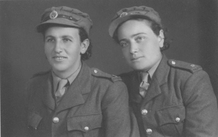 חיילות ישראליות בצבא הבריטי ATS במלחה"ע ה- 2